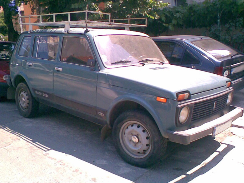 Lada Niva 4 door model (VAZ 2131).